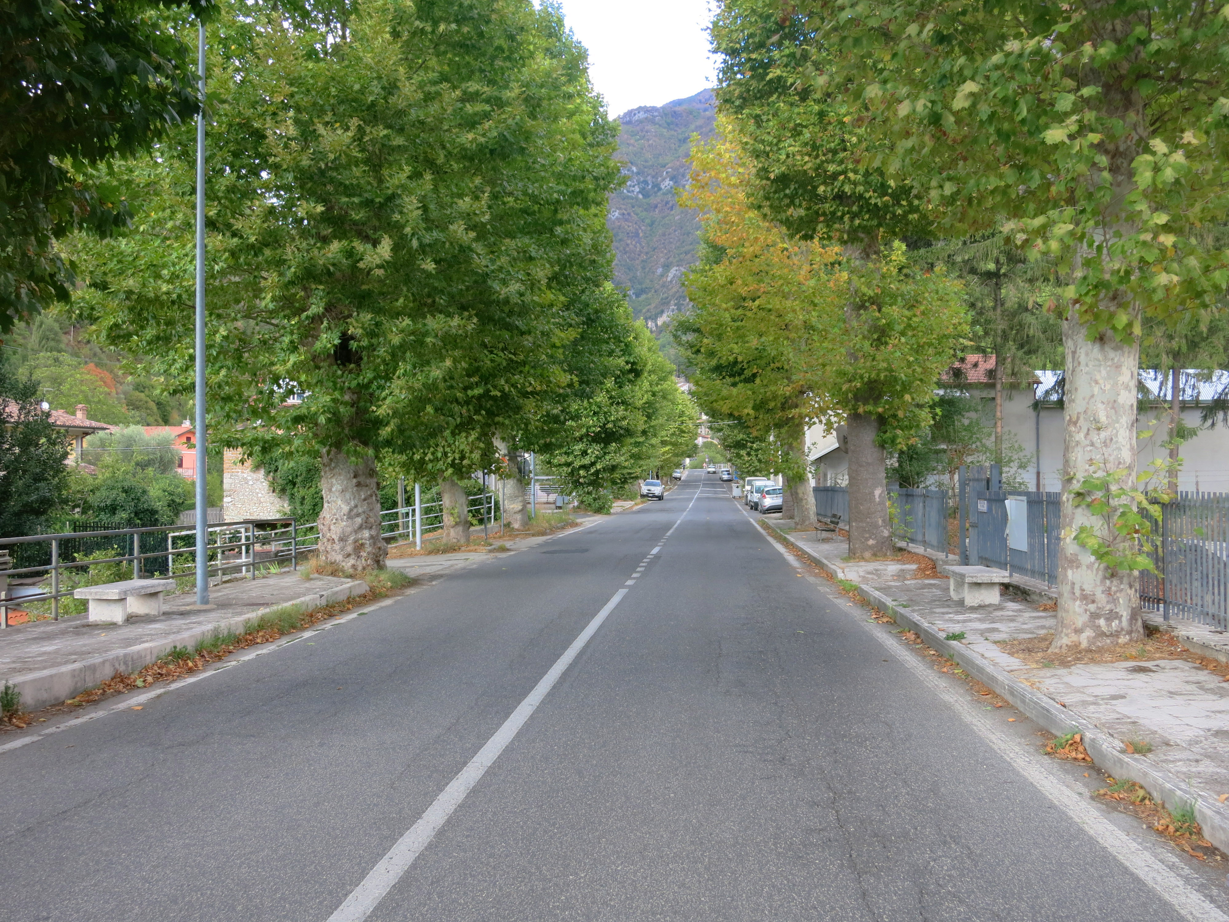 La strada provinciale 14, vecchio percorso della SS4 Via Salaria prima della costruzione della variante esterna al centro abitato, attraversa il paese di Antrodoco (provincia di Rieti, Lazio)